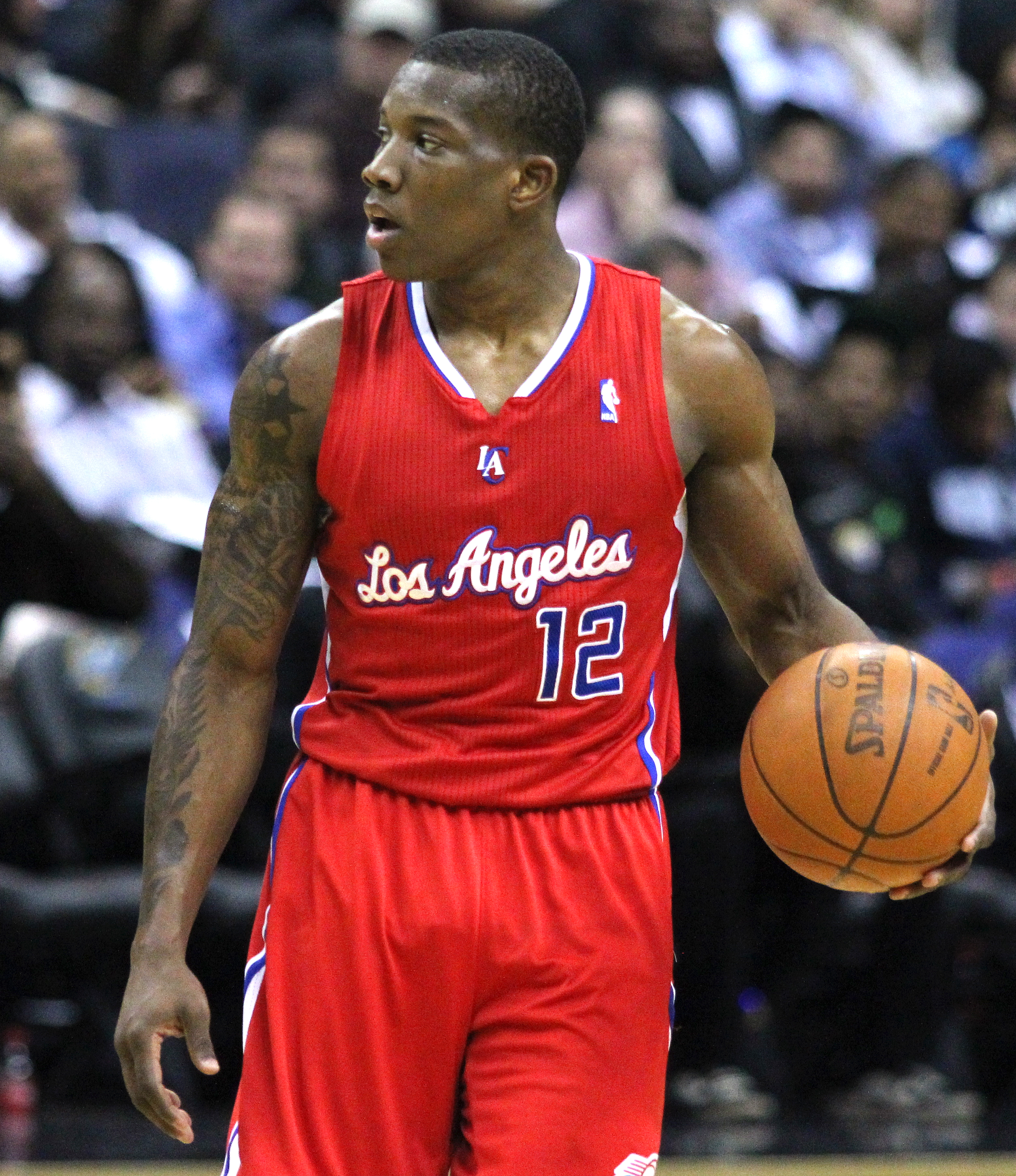 Wizards v/s Clippers 03/12/11